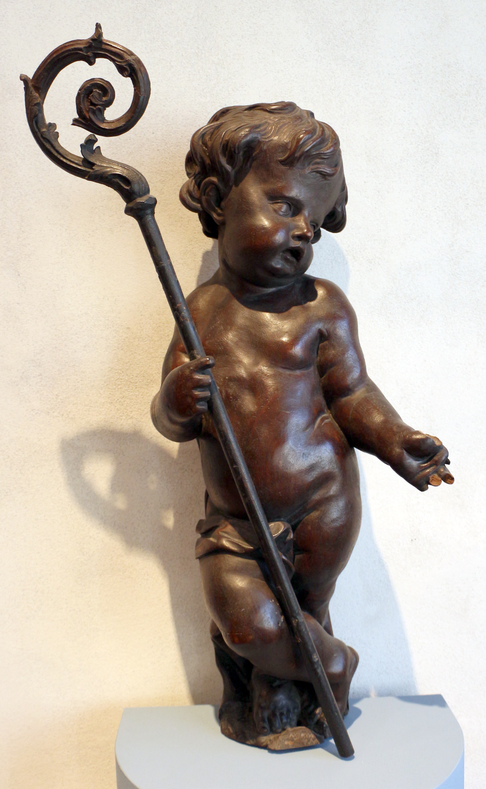 Palazzo Pretorio (Museo Diocesano Tridentino) This is a photo of a monument which is part of cultural heritage of Italy.